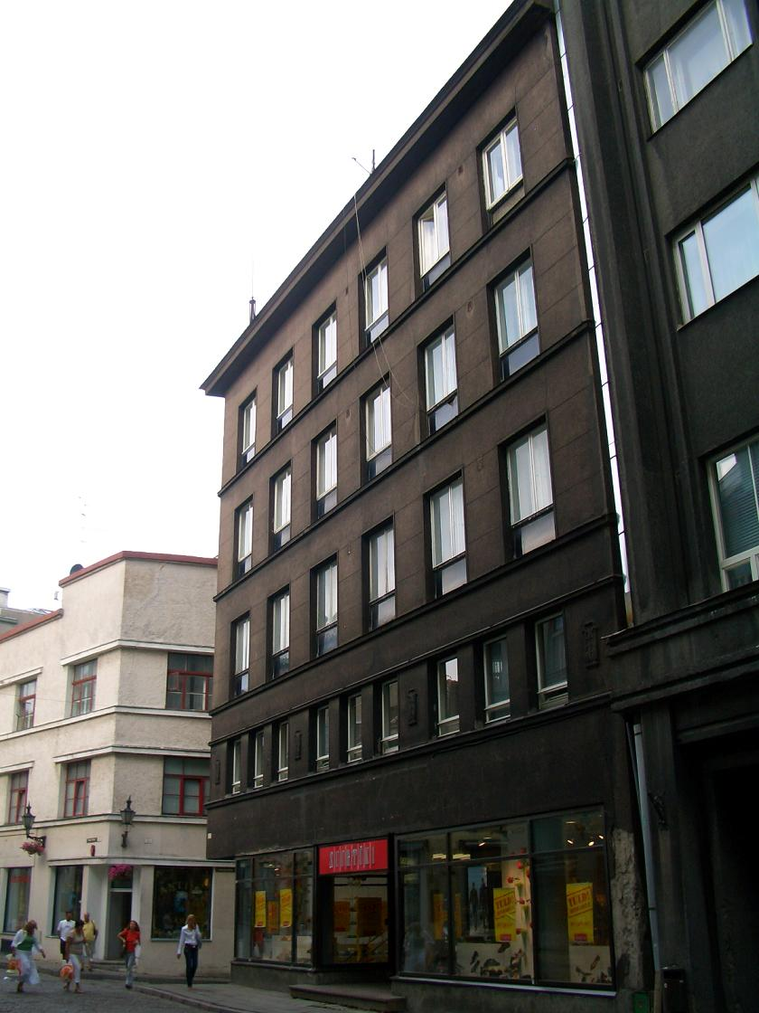 Väike-Karja 7, Tallinnas. 1937, arhitektid Erich Jacoby (1885–1941) ja Hermann Berg (?–?).